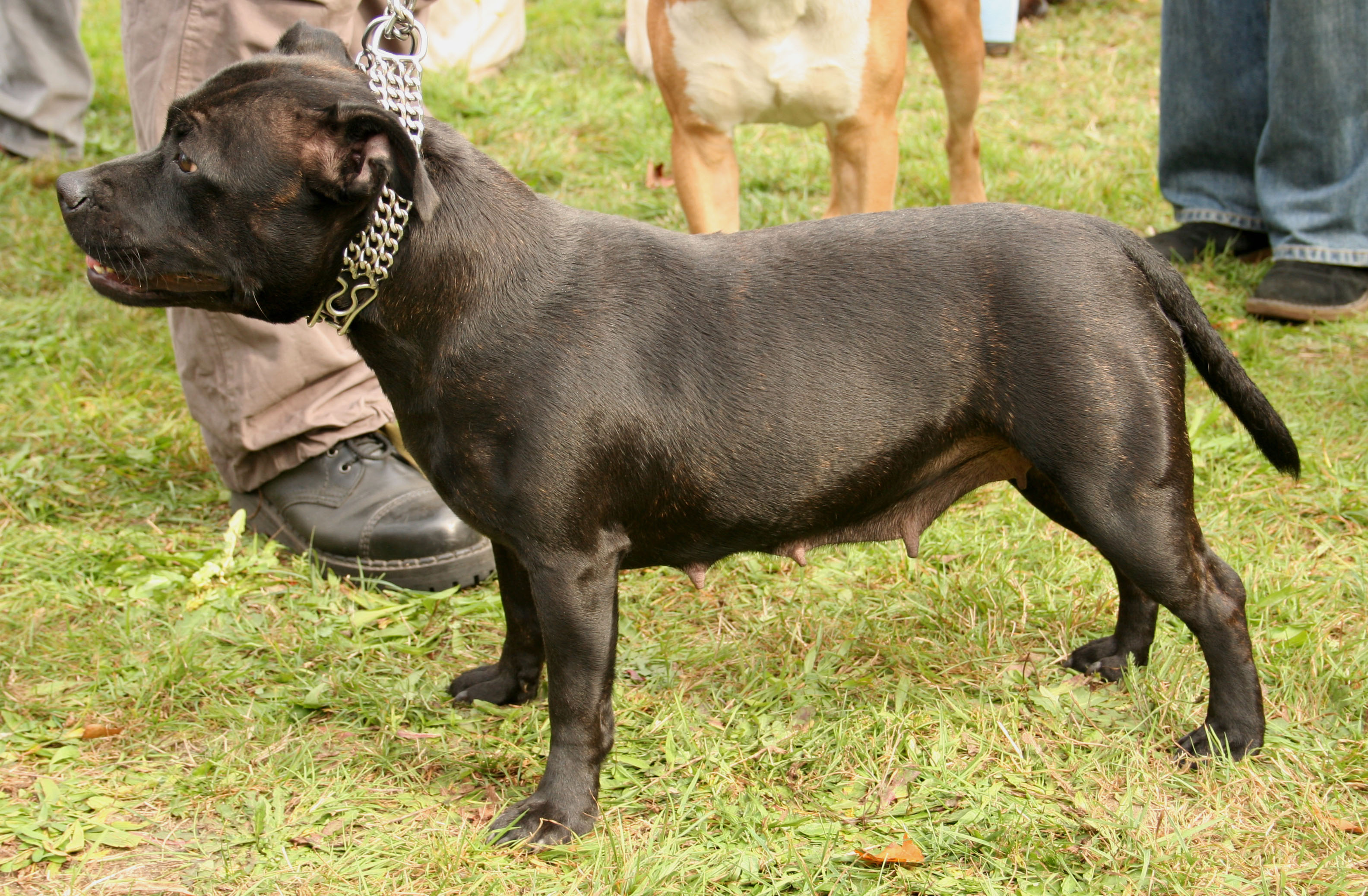 Staford terier na krajowej wystawie w Rybniku - Kamieniu